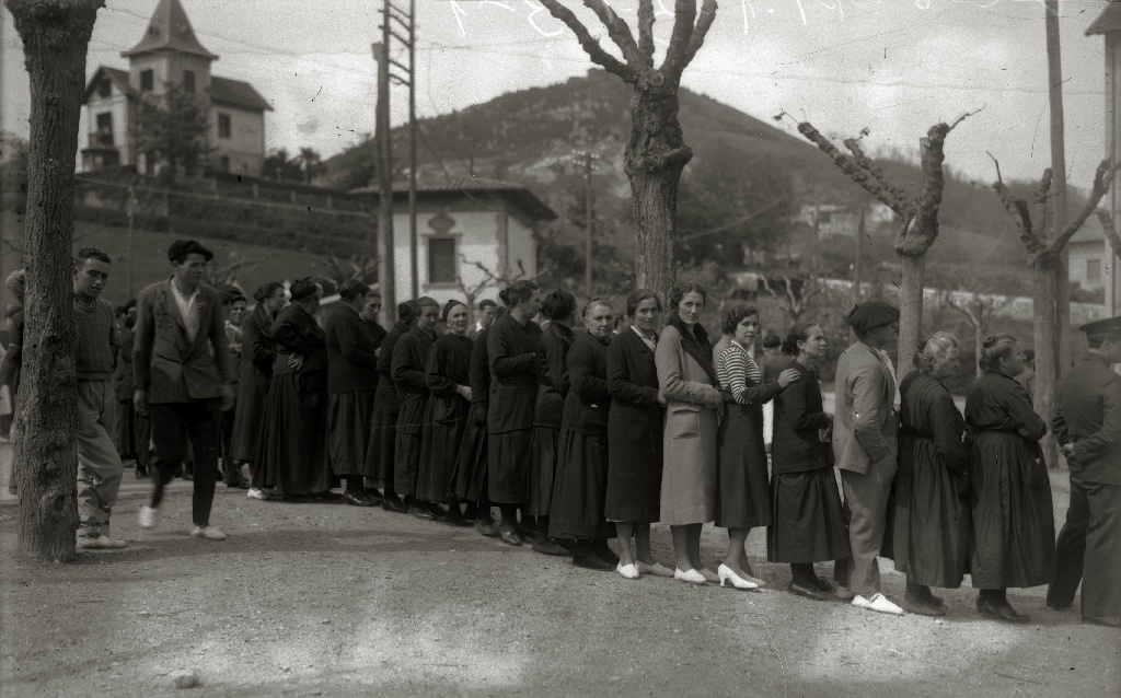 Título original: Personas en Hernani esperando entrar en la Escuela Biteri para emitir el sufragio en las elecciones para concejales (3/4) Localización: Hernani (Guipúzcoa)